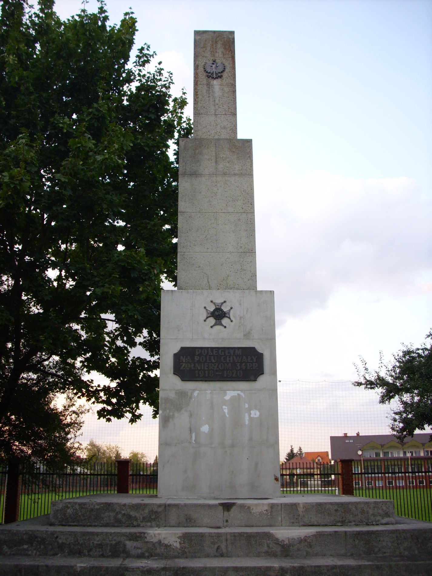 Pomnik ku czci poległych żołnierzy 34 Pułku Piechoty (Biała Podlaska, ul. Warszawska).